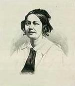 Athalia Schwartz (1821-1871), dansk forfatter og pedagog